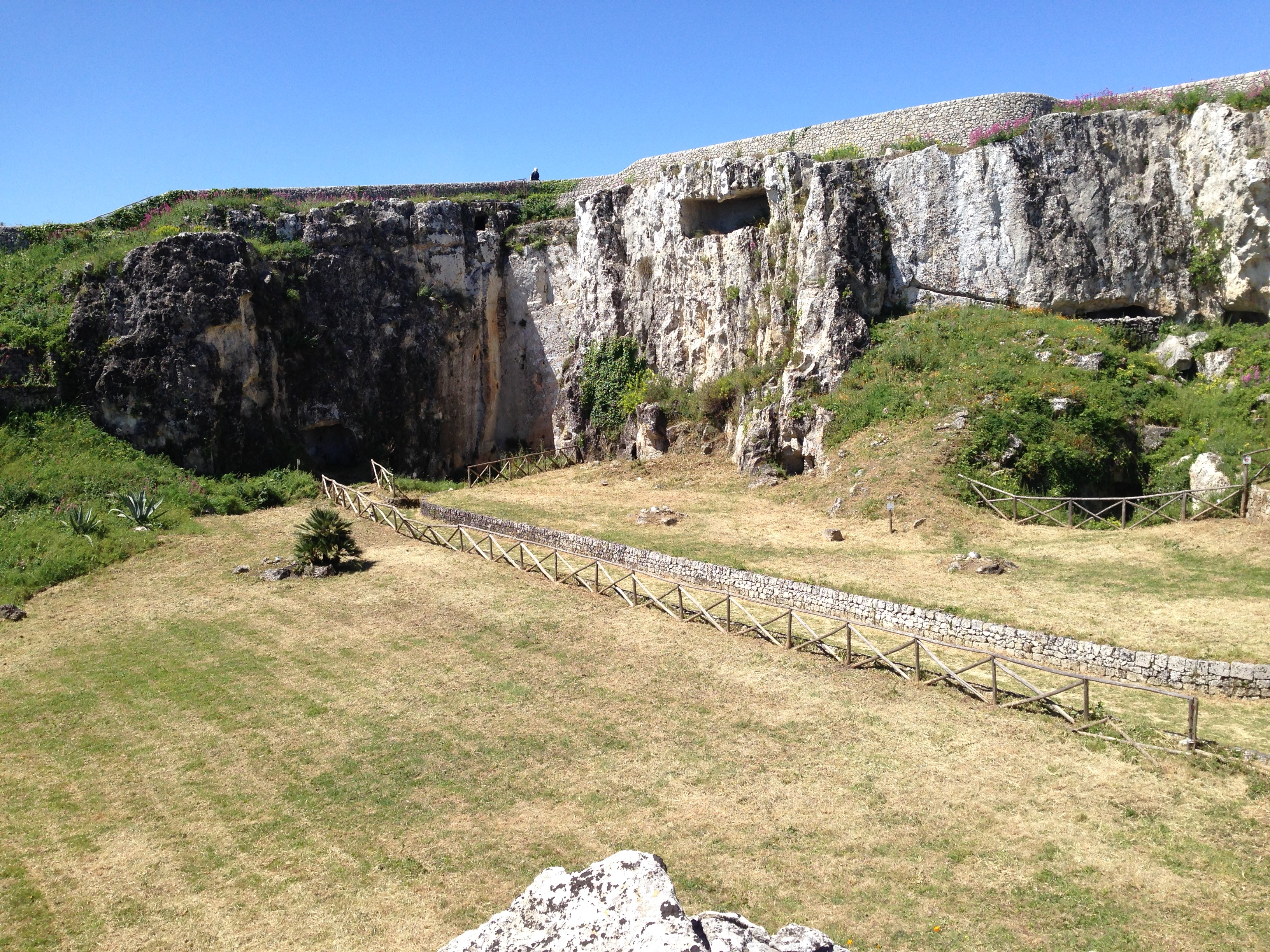 Latomie di Akrai